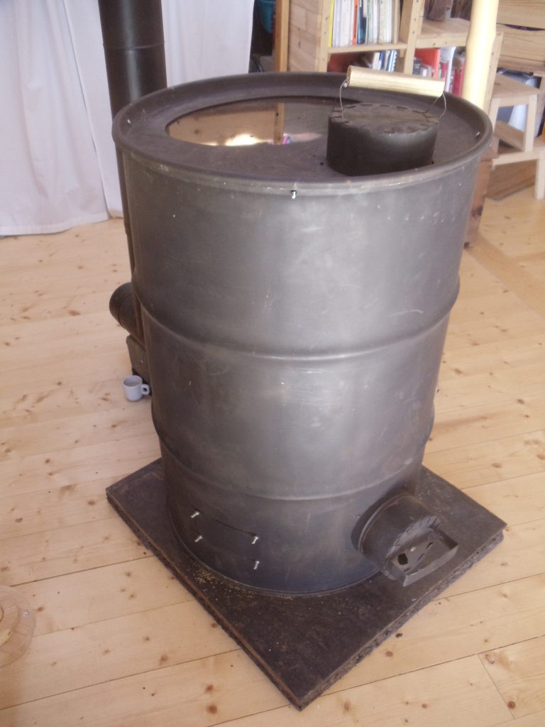 Le poêlito est un poêle de type rocket stove dédier au habitat léger/mobile. Il est ici installé dans une yourte.